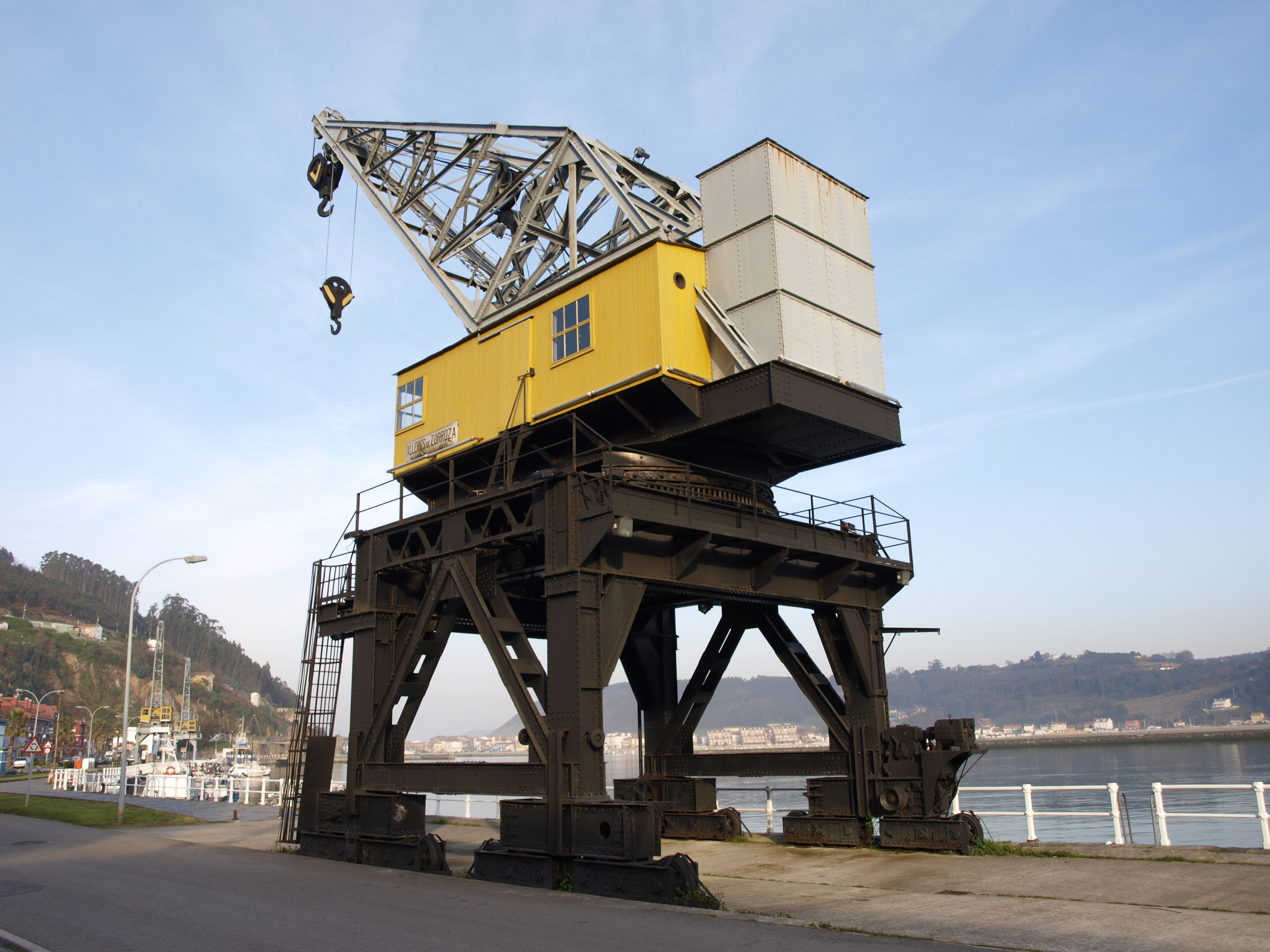 Grua portuaria - San Esteban de Pravia